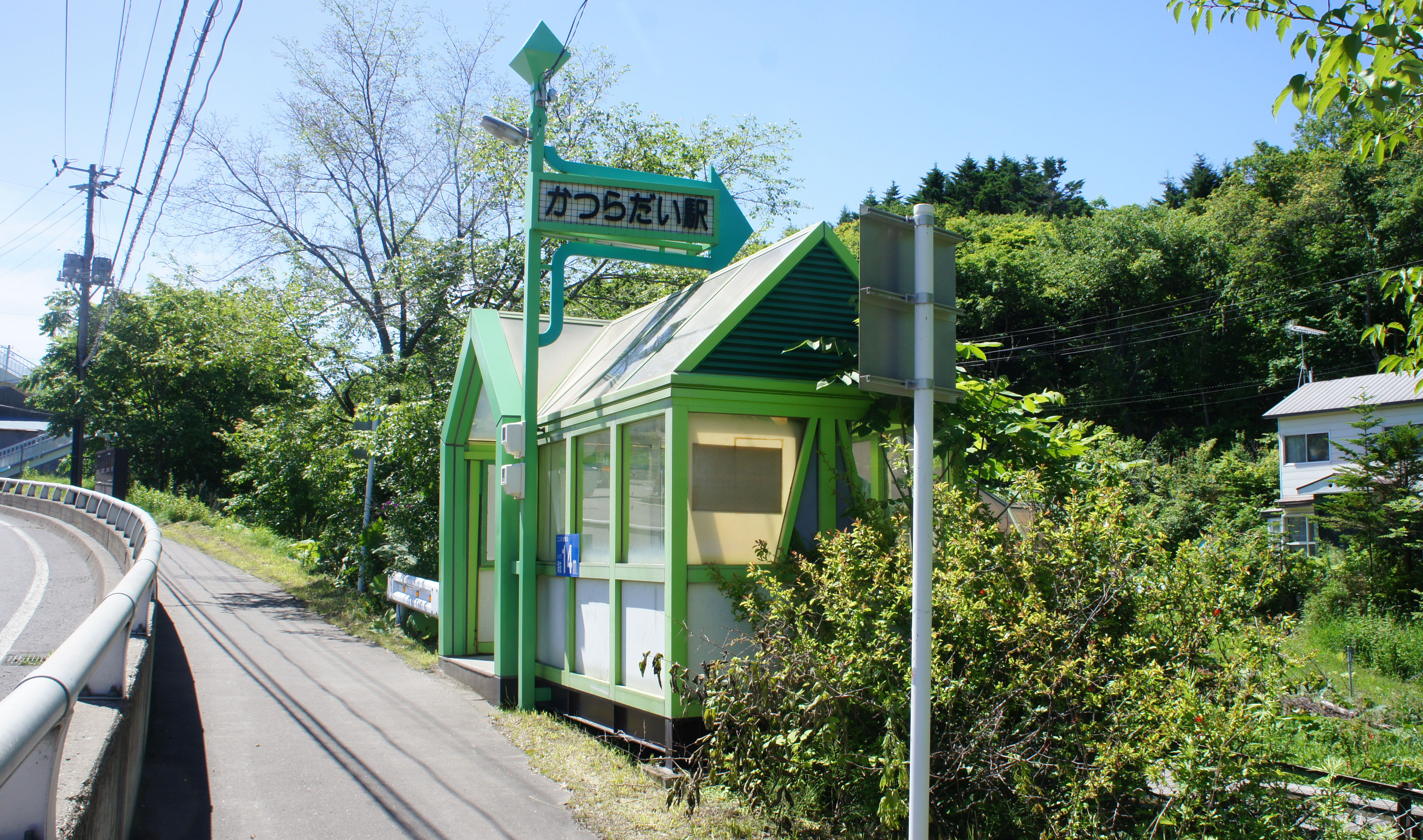 JR釧網本線・桂台駅出入口